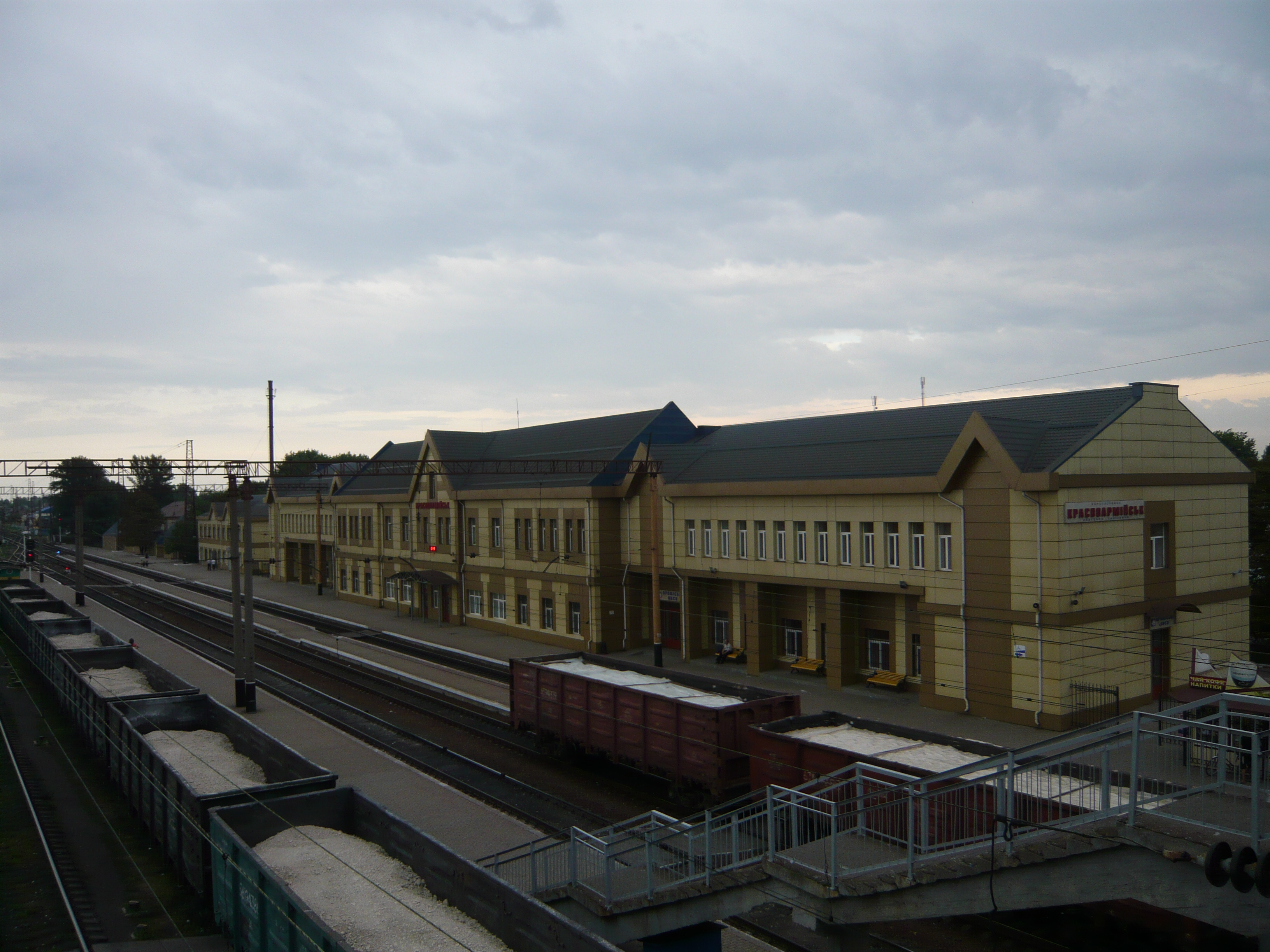 Вокзал станции Красноармейск Донецкой железной дороги